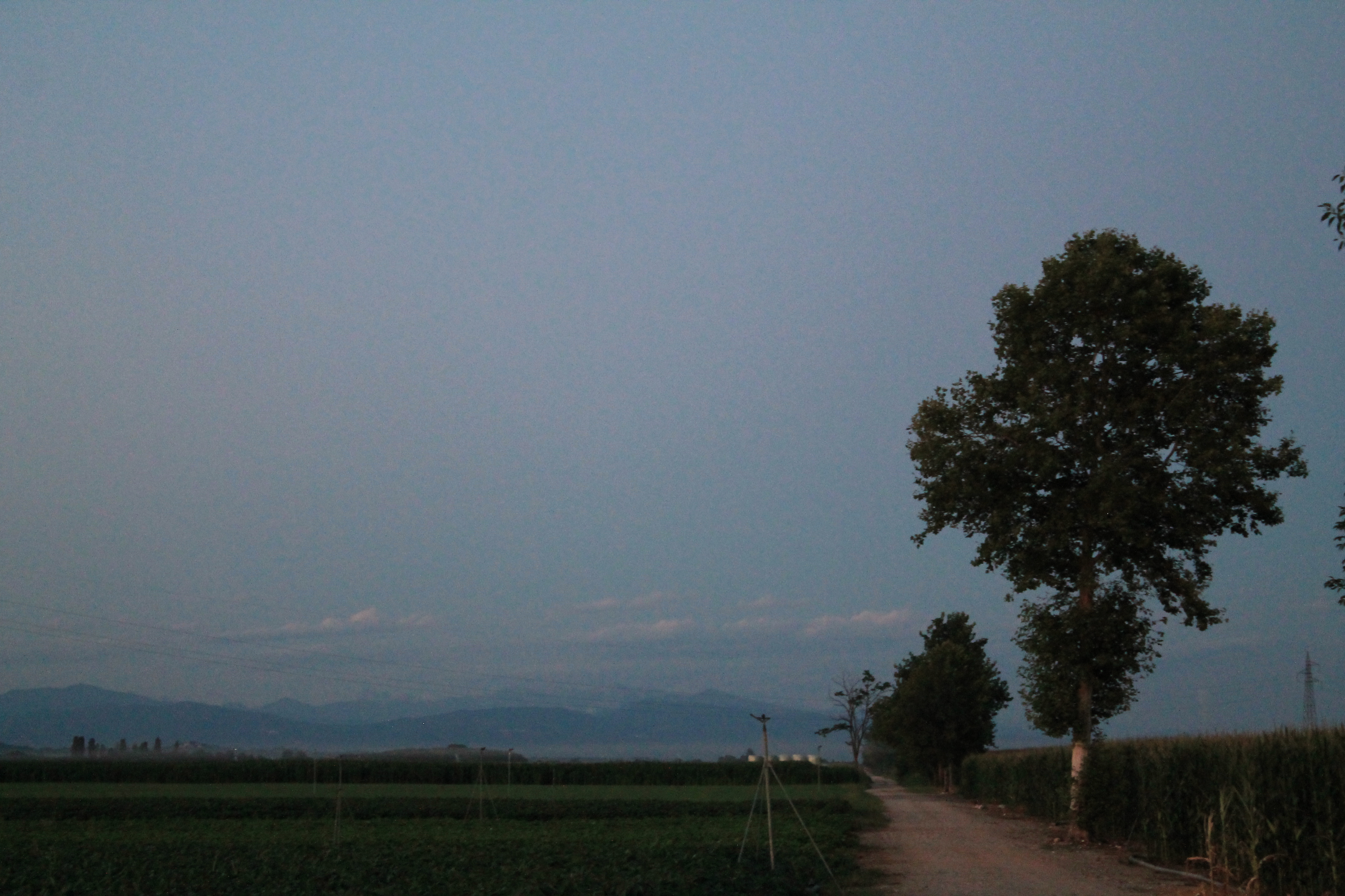 Foto di F. Curridor. Flaibano, panorama dei campi in località "San Michel", visuale verso Est direzione Nogaredo.